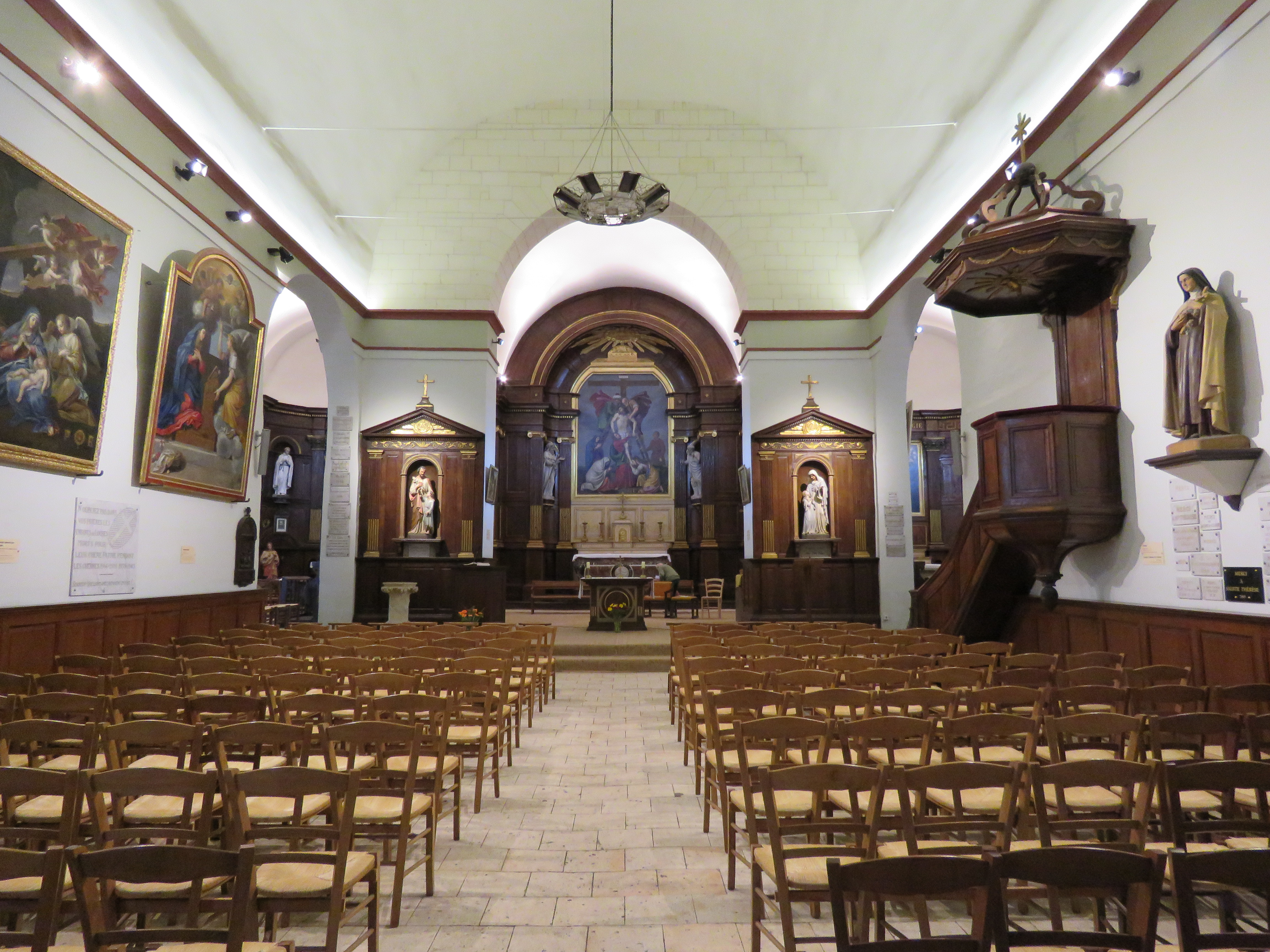 Intérieur de l'église Saint-Antoine